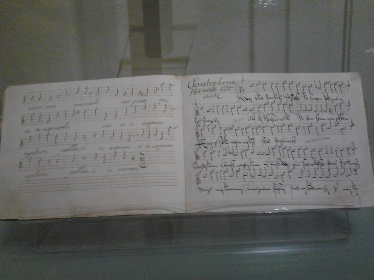 Faksimile vícehlasé písně Dejž tobě Pán Bůh štěstí, rukopis přelom 16. a 17. stol.